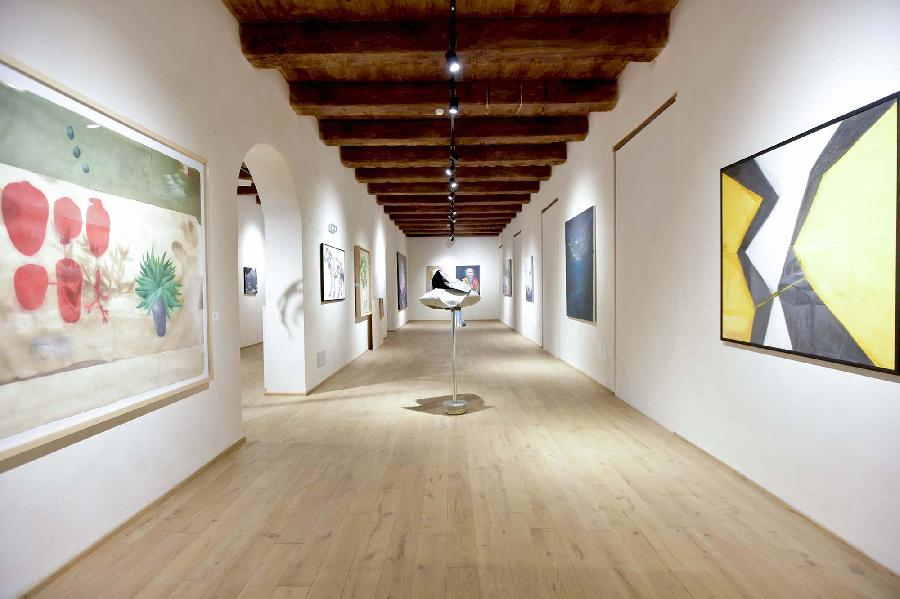 Veduta interna del Museo d'arte contemporanea di Cosenza allestito nel Chiostro di San Domenico nel centro storico